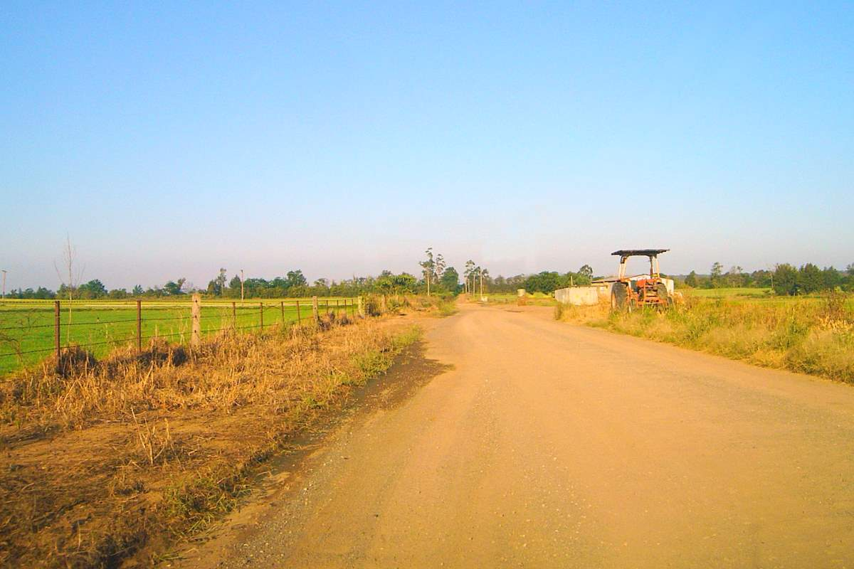 An agricultural area in Windsor.